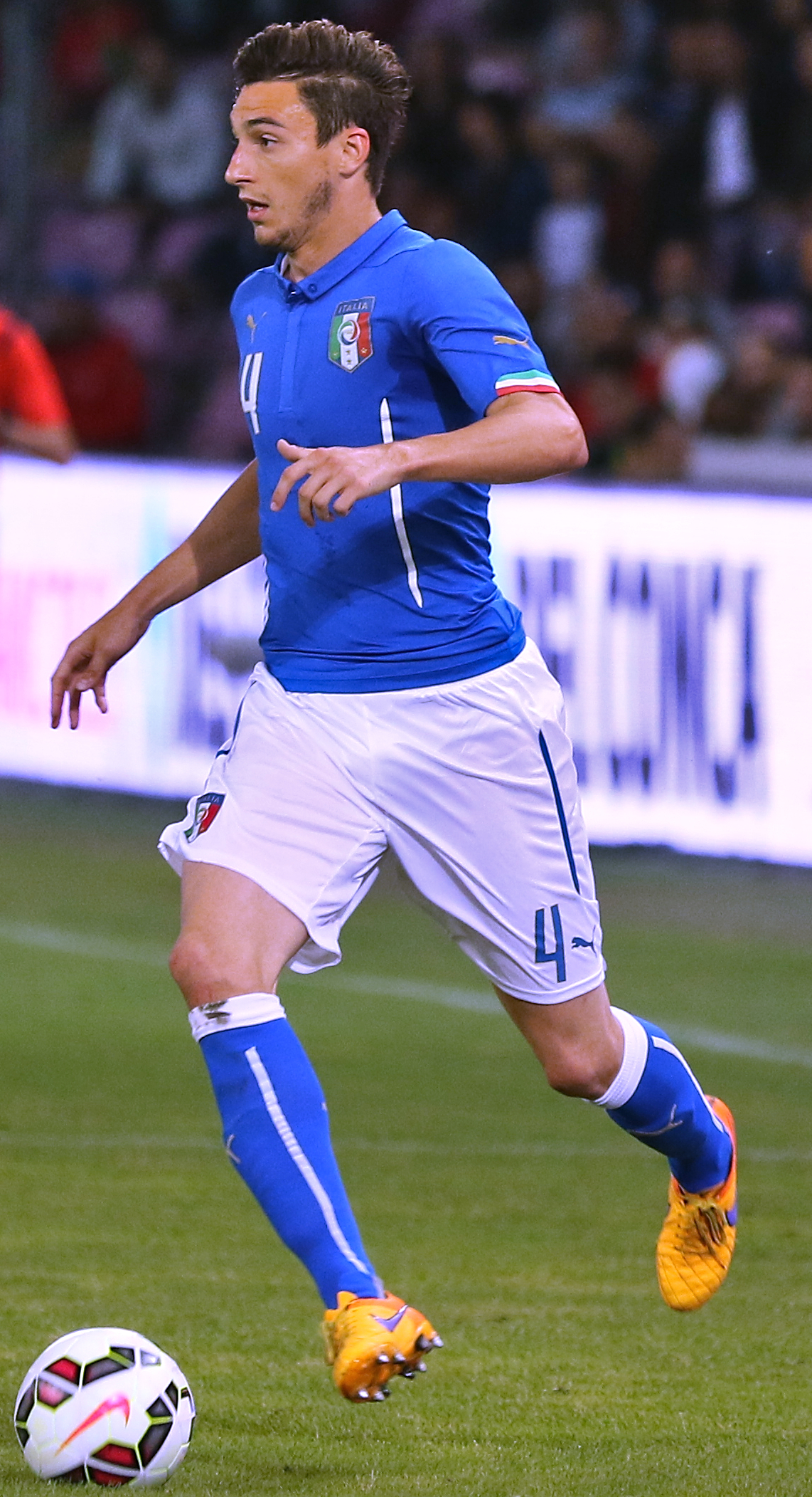 20150616 - Portugal - Italie - Genève - Matteo Darmian